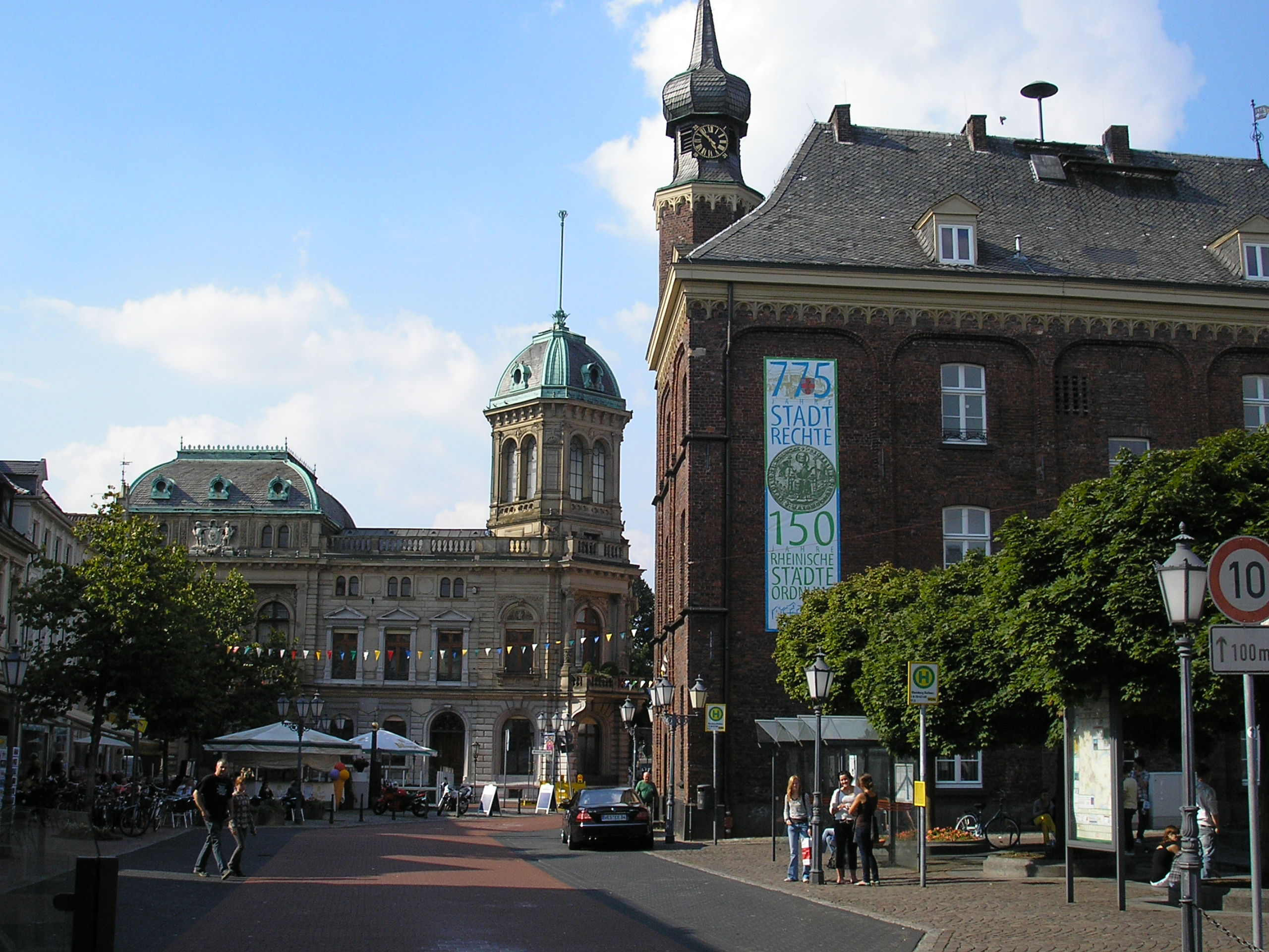 Rheinberg, Altes Rathaus mit Palais Underberg.